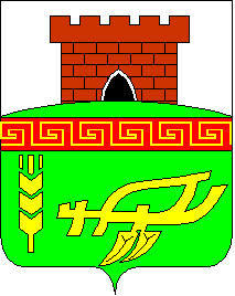 Герб Старомлиновки